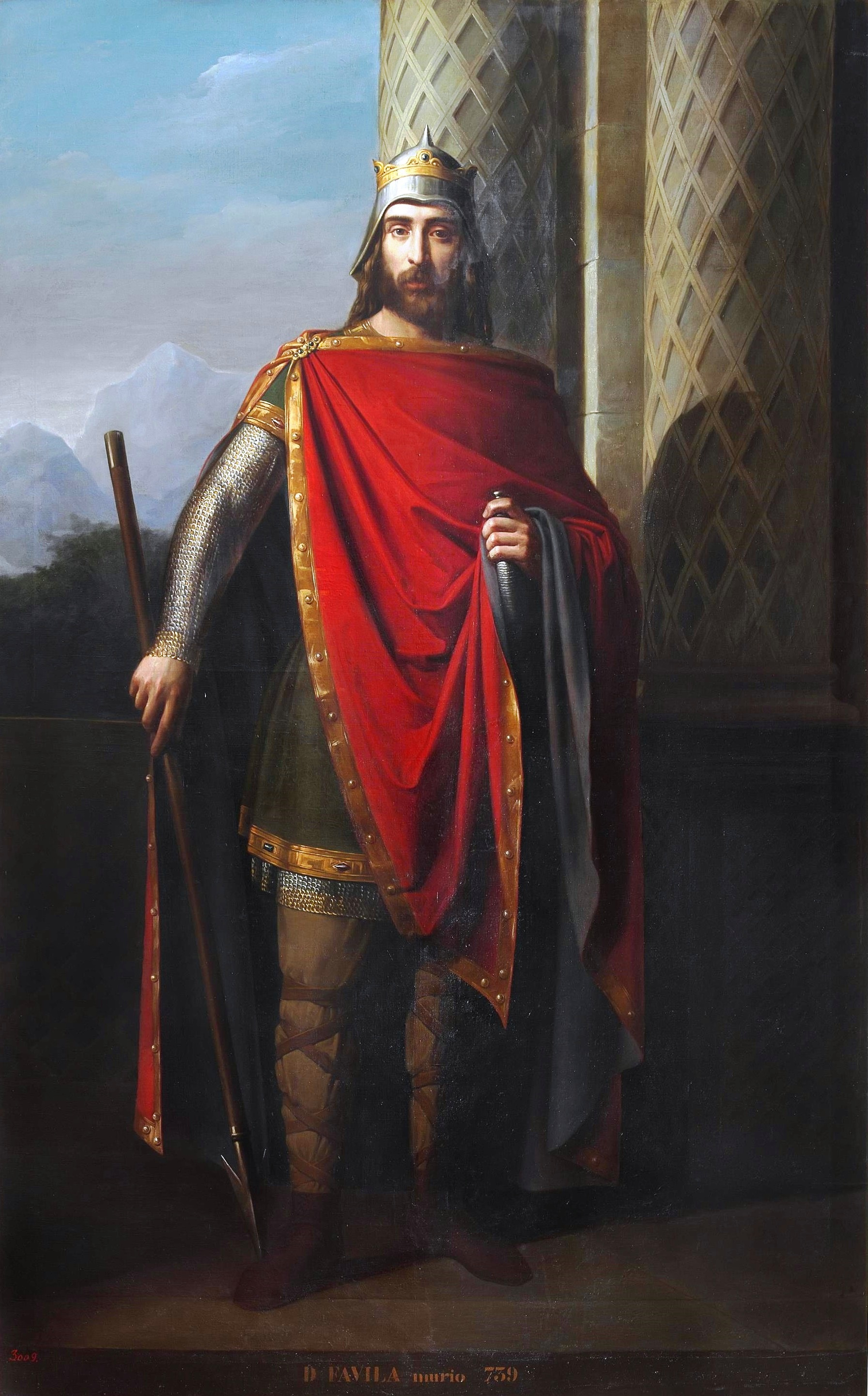 Retrato imaginario de Don Favila († 739), rey de Asturias e hijo del rey Don Pelayo y de la reina Gaudiosa.